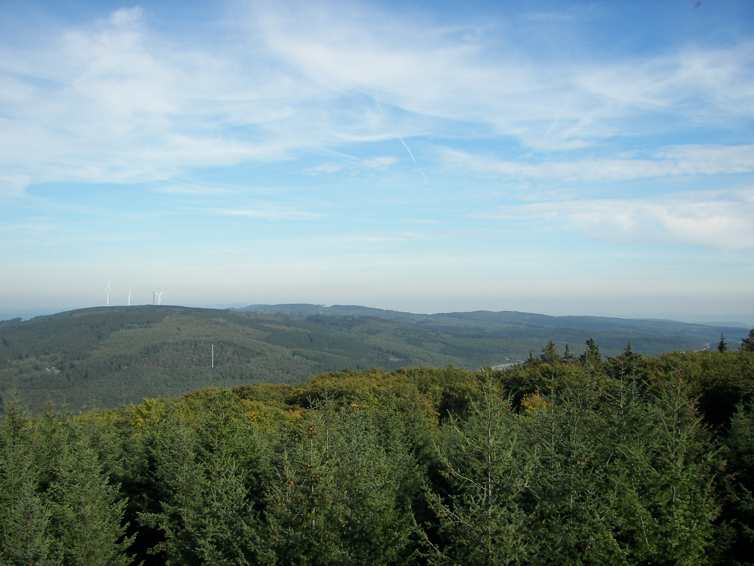 Binger Wald, vom Hochsteinchen aus gesehen